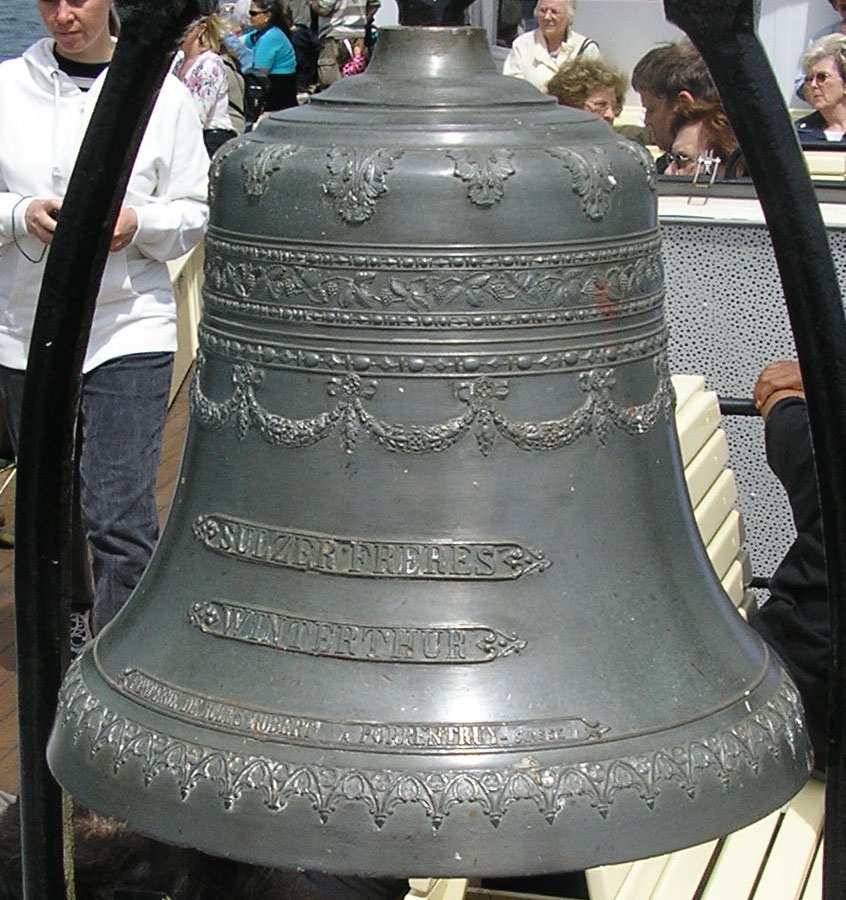 Bateau à vapeur La Suisse, journée inaugurale, cloche.